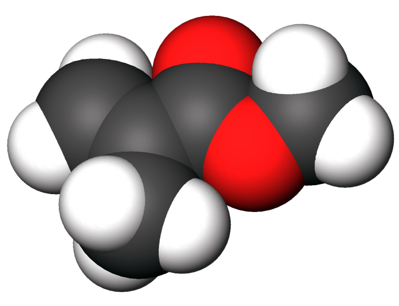 Methyl methacrylate